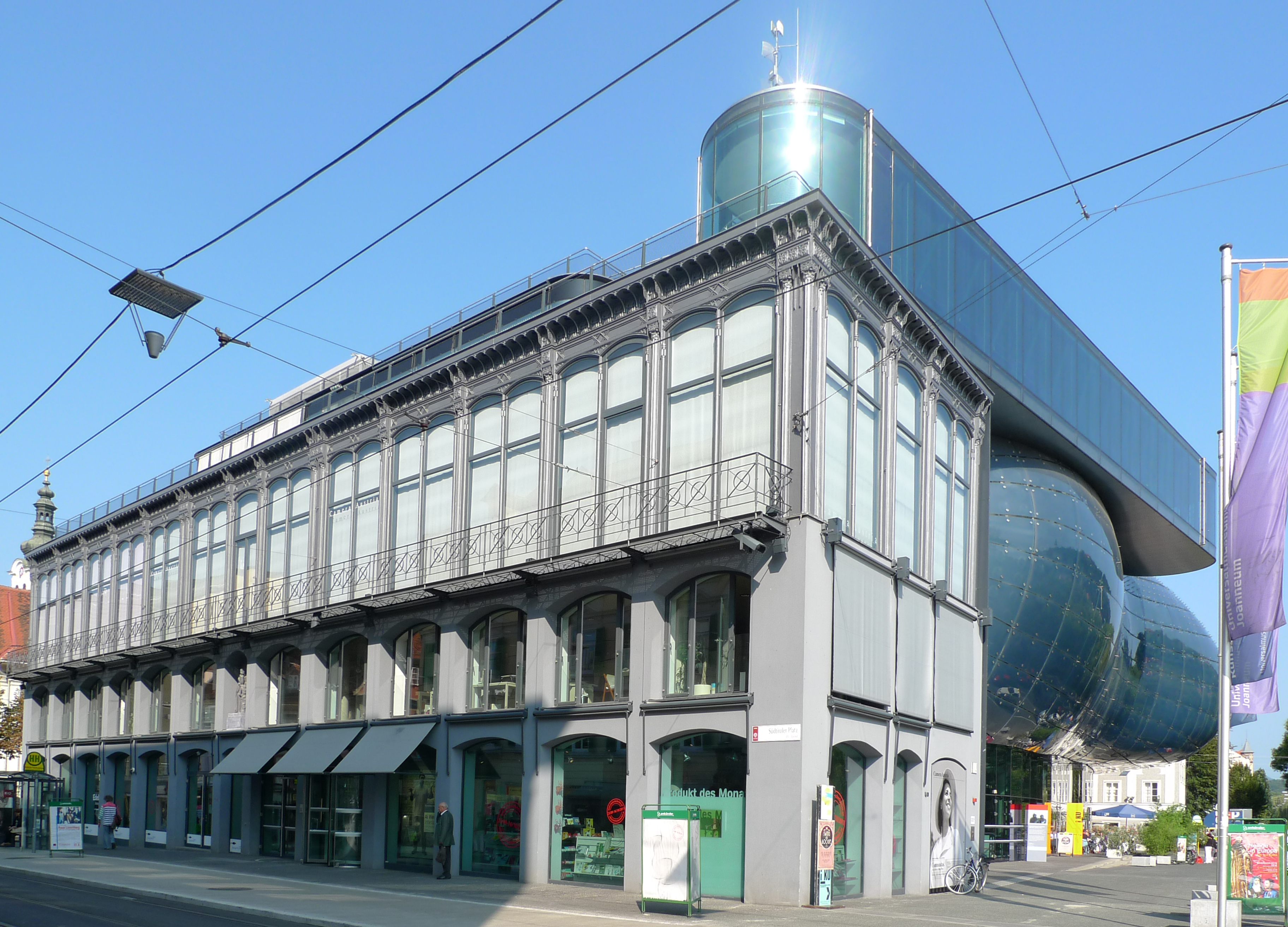 Sogen. Eisernes Haus